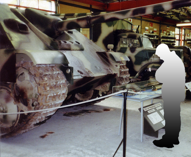 Beschreibung: Jagdpanther mit Größenvergleich (Größe der Person ca. 1,70 m)